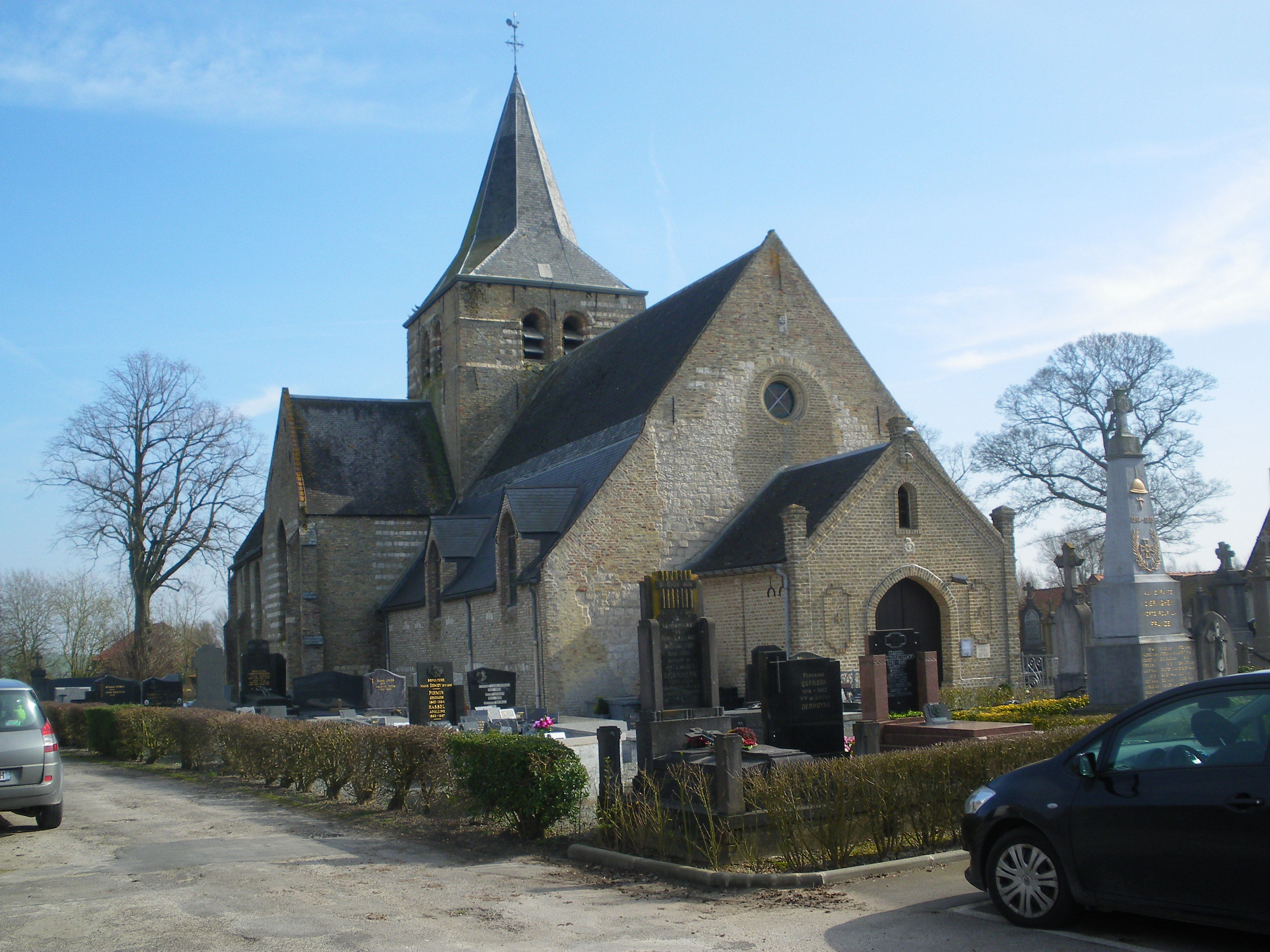 Vue de l'église Saint-Matthias et du monument aux morts d'Eringhem.